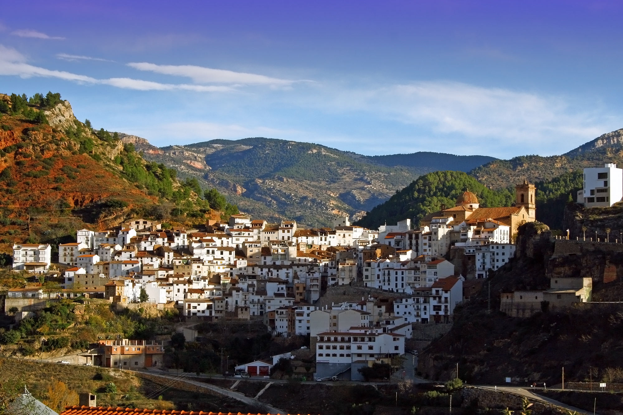 Villahermosa del Río, Castellón, España.